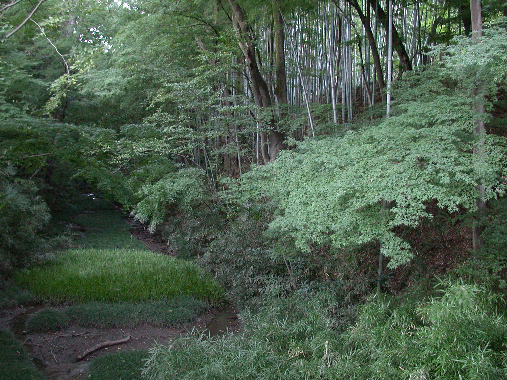 Tsutsujigasaki Castle Hori